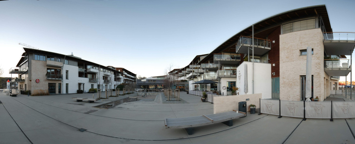 Fritzøe brygge